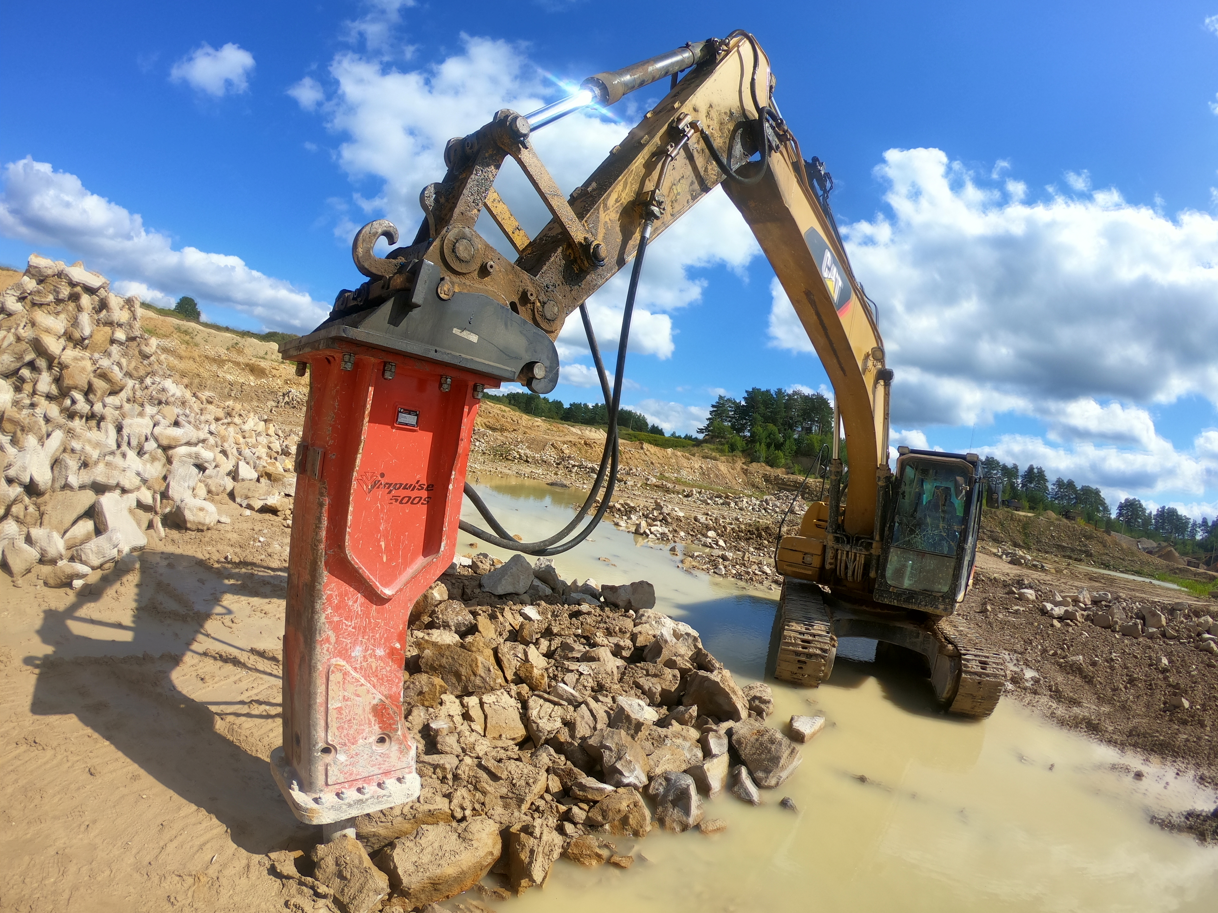 Гидромолот Impulse